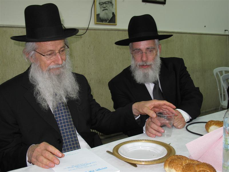 ישיבת מרכז הרב הרב שפירא יחד עם הרב זלמן מלמד בחדר האוכל של ישיבת מרכז הרב